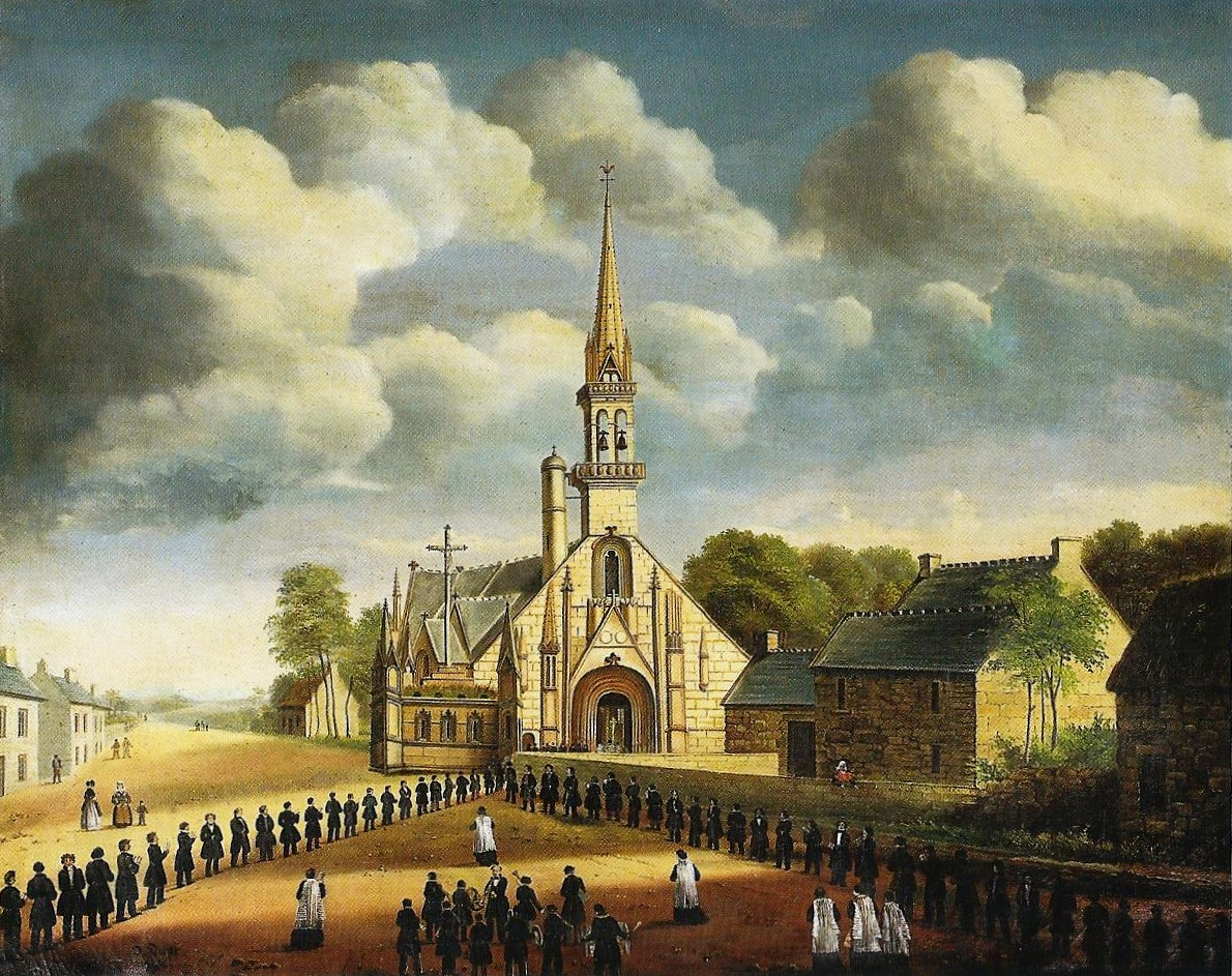 Dominique-Marie Dupé : Les séminaristes de Pont-Croix en pèlerinage à Notre-Dame de Confort (évêché de Quimper, vers 1850). À cette date, le calvaire de Confort, vandalisé lors de la Révolution française, n'a pas encore été restauré.